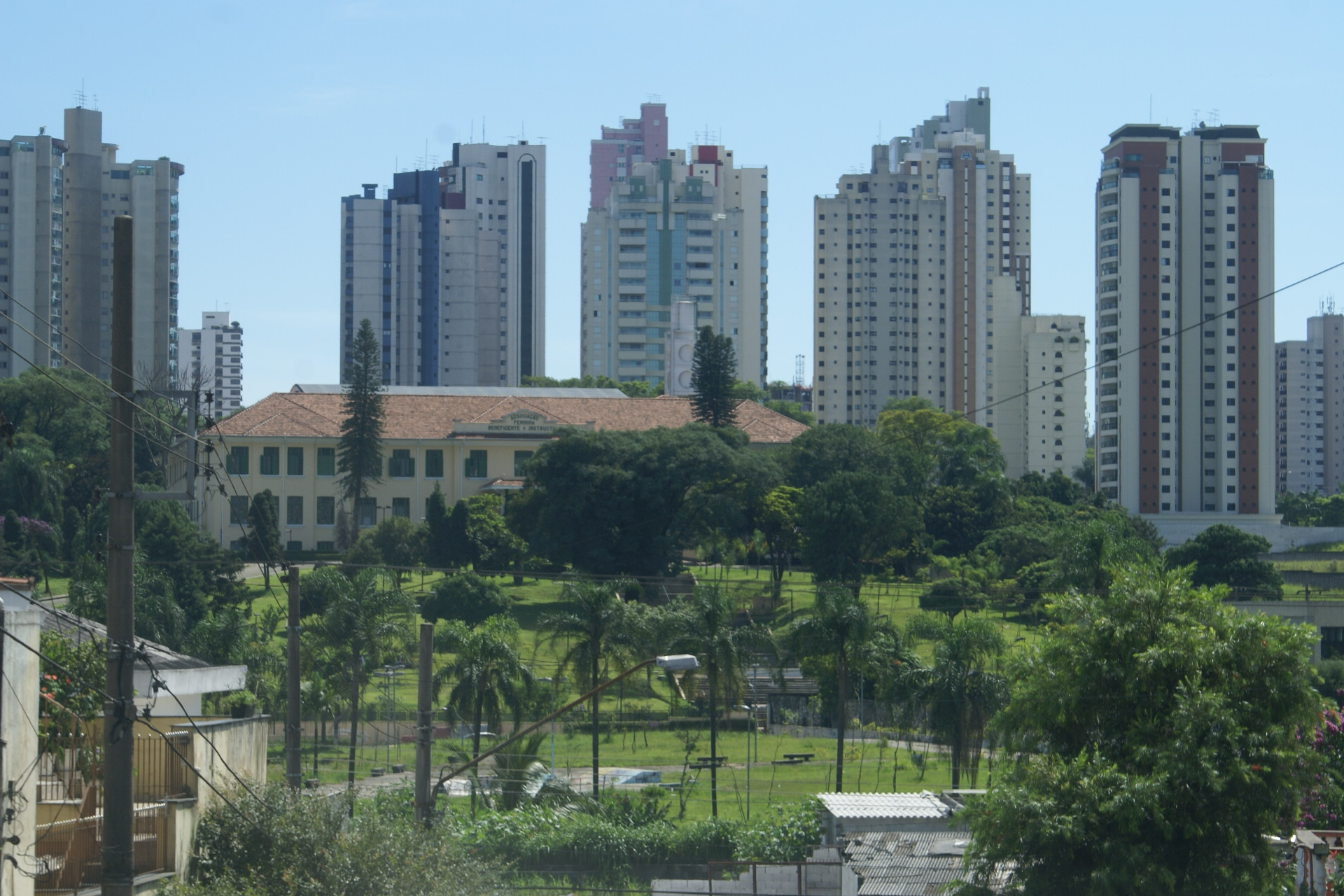 Casa do Regente Feijó no bairro do Jardim Anália Franco, Zona Leste de São Paulo. - Casa do Regente Feijó in Jardim Anália Franco neighborhoods, East Zona of São Paulo City, Brazil.